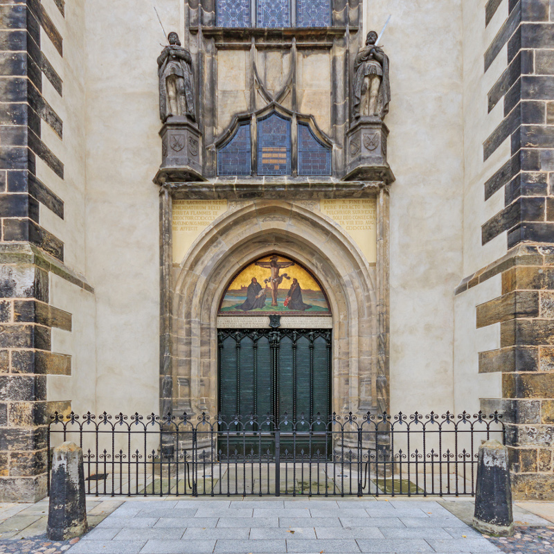 Puerta de la Schlosskirche, Iglesia del Palacio, donde se dice que Lutero clavó sus tesis